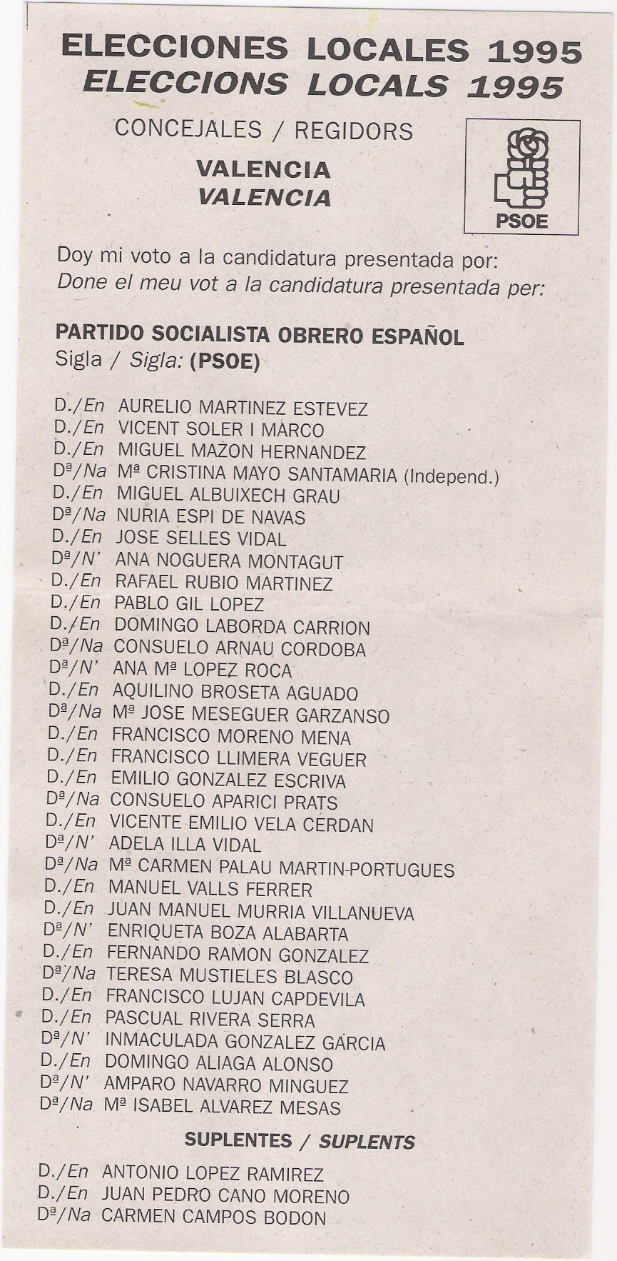 Papeleta electoral del PSOE. Elecciones locales de 1995. Municipio de Valencia.